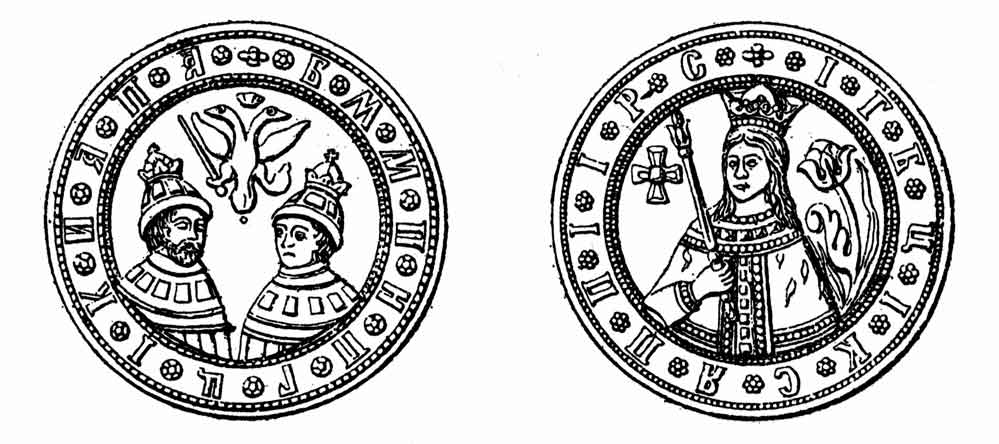 Медаль царевичей Иоанна и Петра Алексеевичей и царевны Софьи.